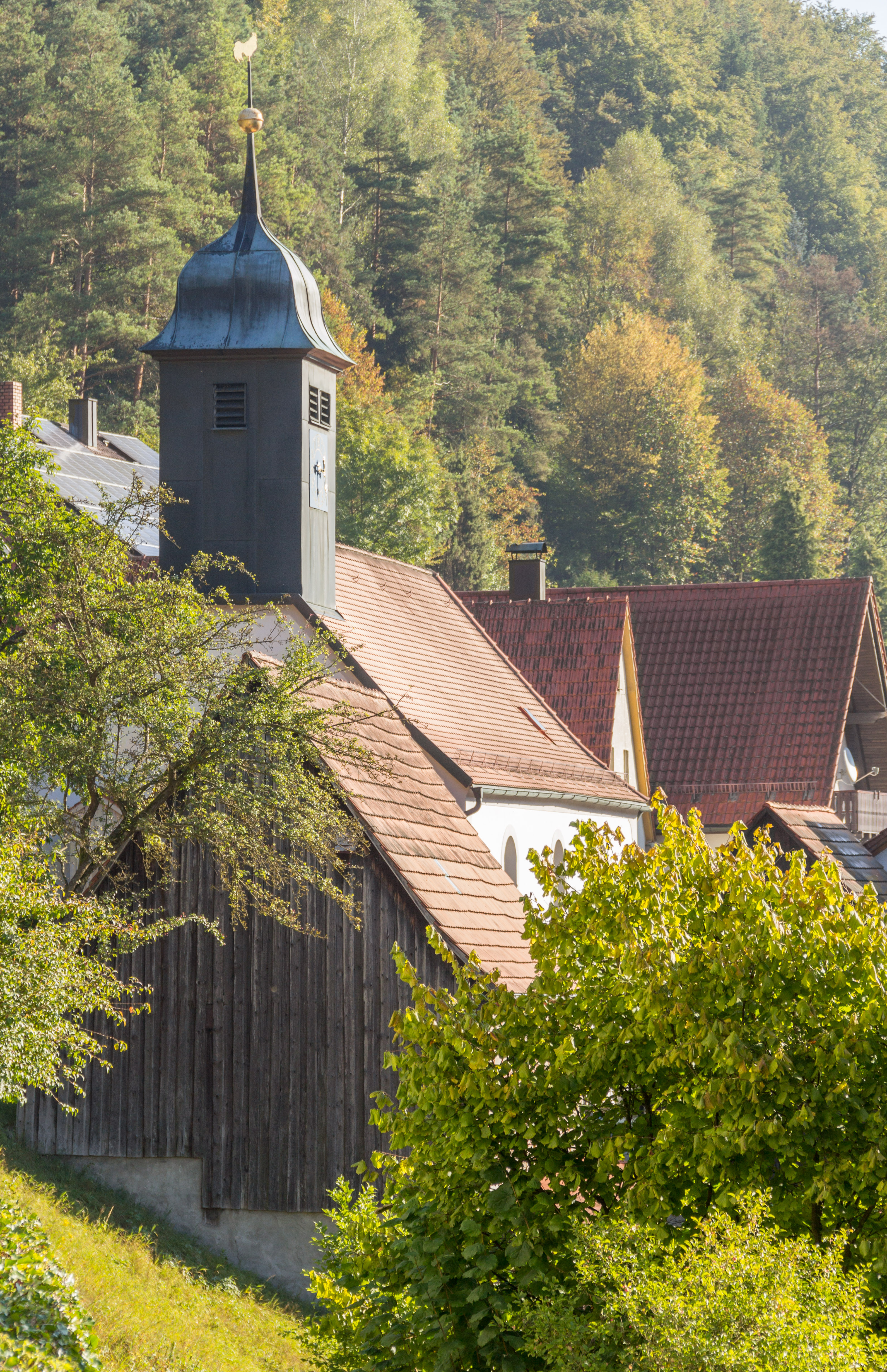 Ehemalige Schlosskapelle, Barock, HirschbachThis is a photograph of an architectural monument.